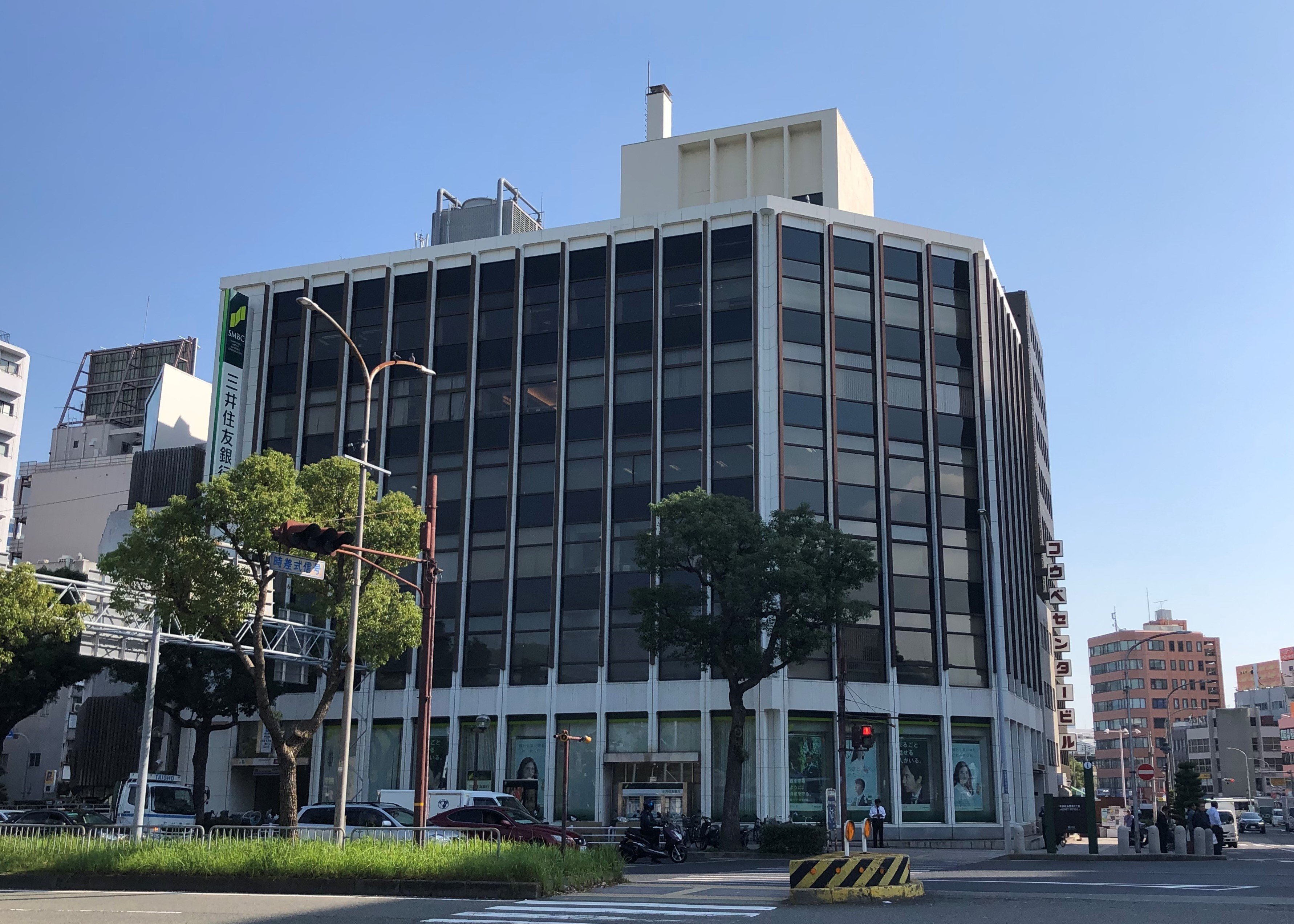 神戸楠公前ビル